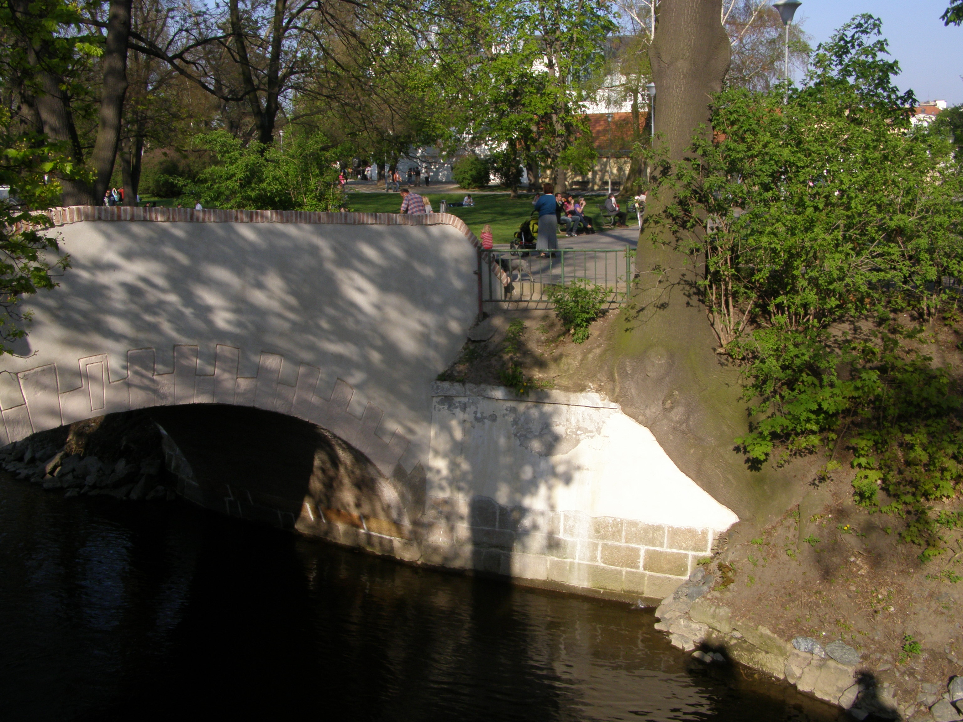 Praha, Malá Strana, mostek přes Čertovku